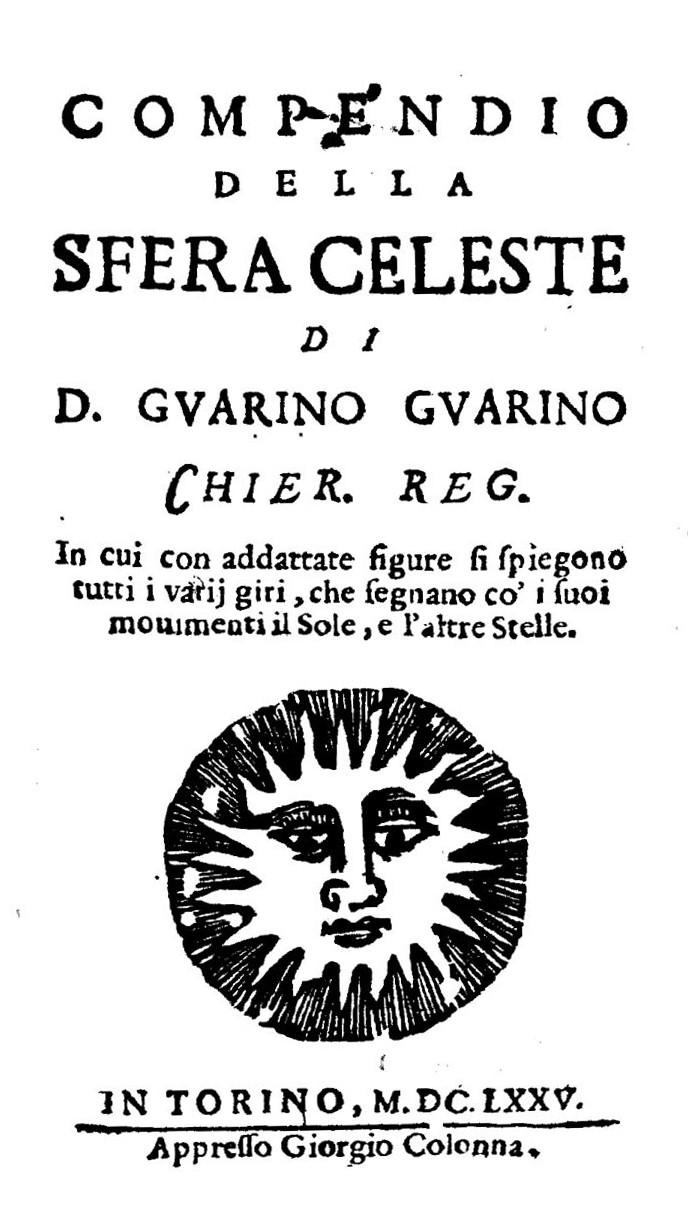 Compendio della sfera celeste di d. Guarino Guarino chier. reg. In cui con adattate figure si spiegono tutti i varij giri, che segnano co'i suoi mouimenti il sole, e l'altre stelle. - In Torino : appresso Giorgio Colonna, 1675. - [4], 126, [2] p. : ill. ; 12° . Frontespizio